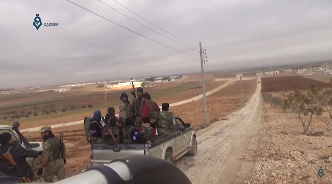 Bataille d'al-Bab 14 décembre 2016